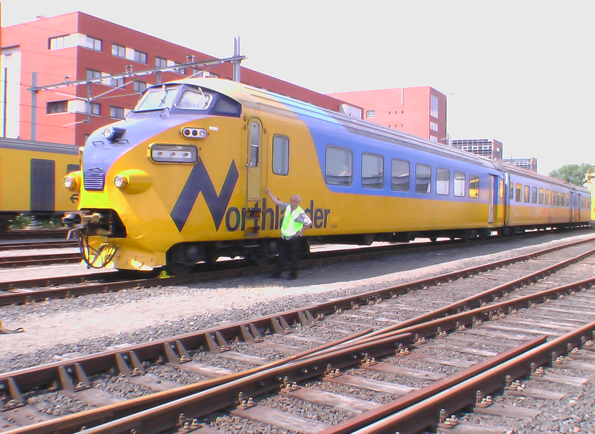 De opname van mij van de Northlander mag wat mij betreft gebruikt worden voor allerlei doeleinden, dus ik heb geen bezwaar tegen gebruik van mijn foto. Ik hoop dat dit voldoende is.